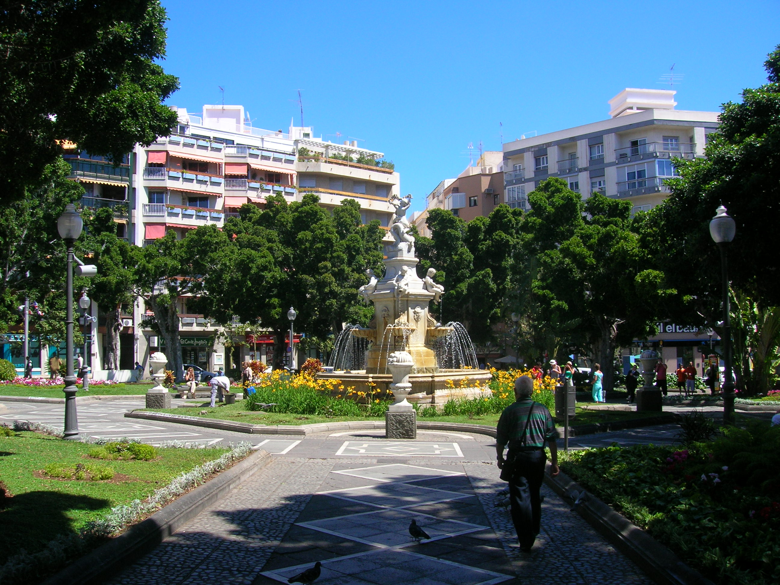 Plaza de Weyler, en Santa Cruz de Tenerife. Foto por Sergio Sánchez, el 24 de marzo de 2006.